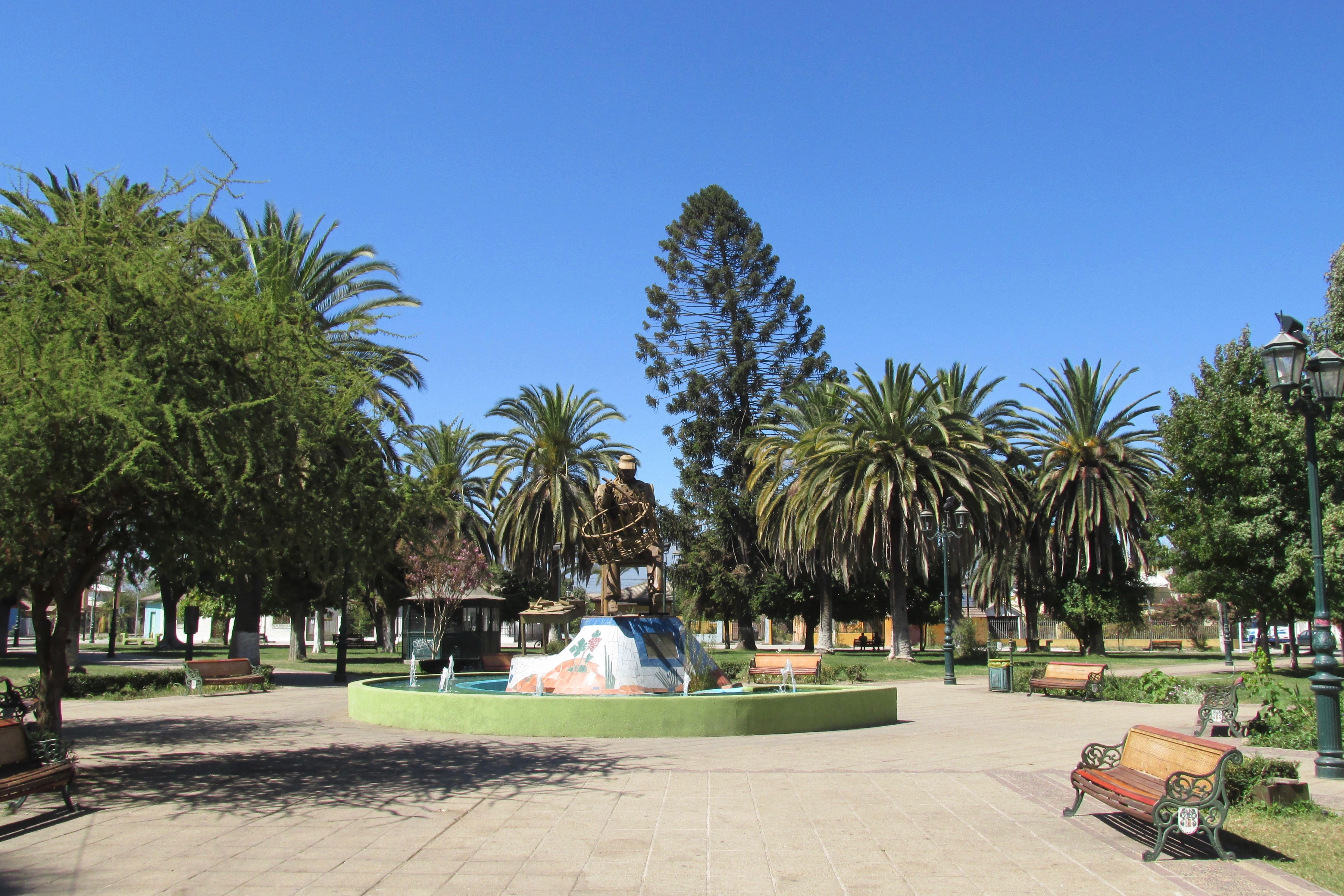 Plaza de Armas comuna de Chimbarongo Chile